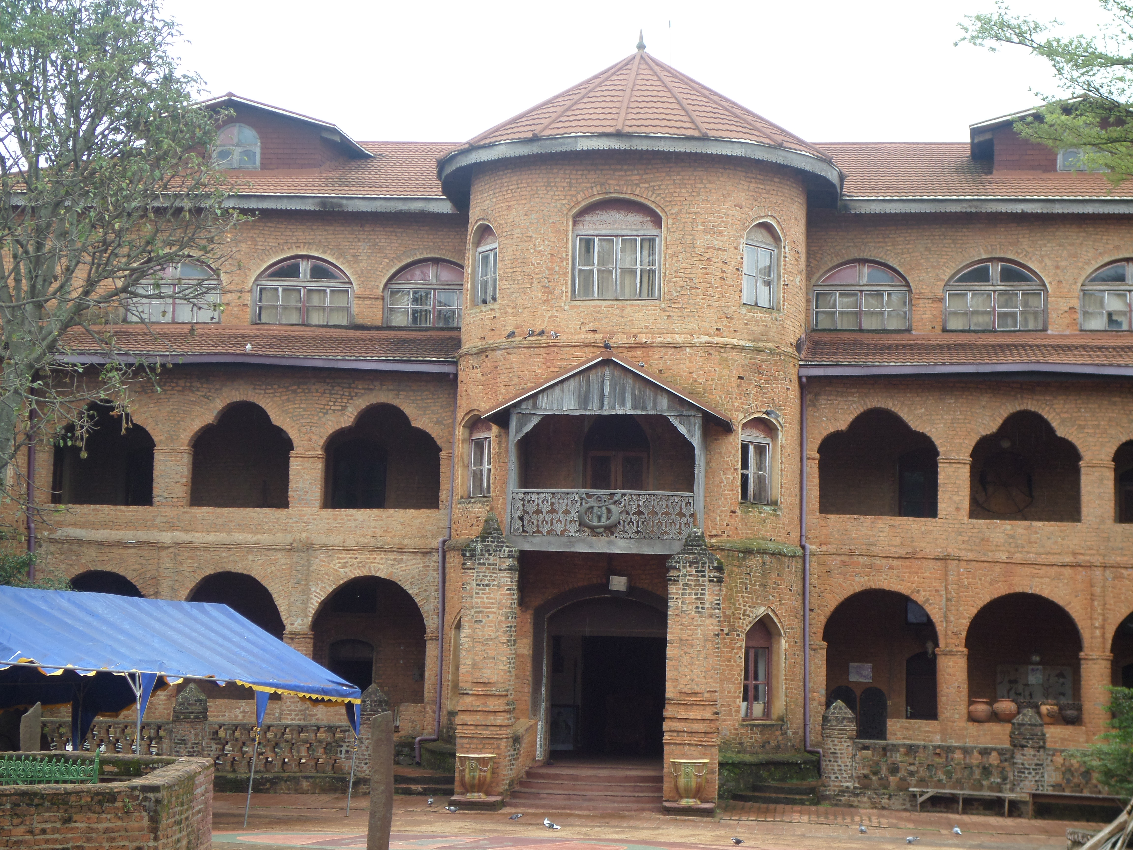 Sultanat de Foumban